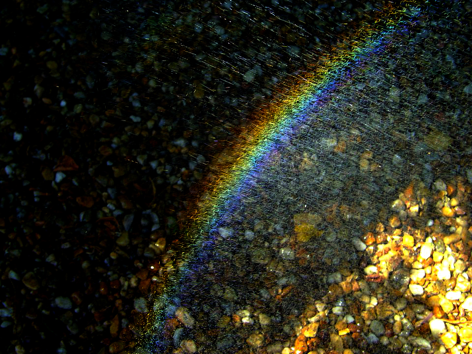 Arc-en-ciel produit à l'aide d'un arrosoir.